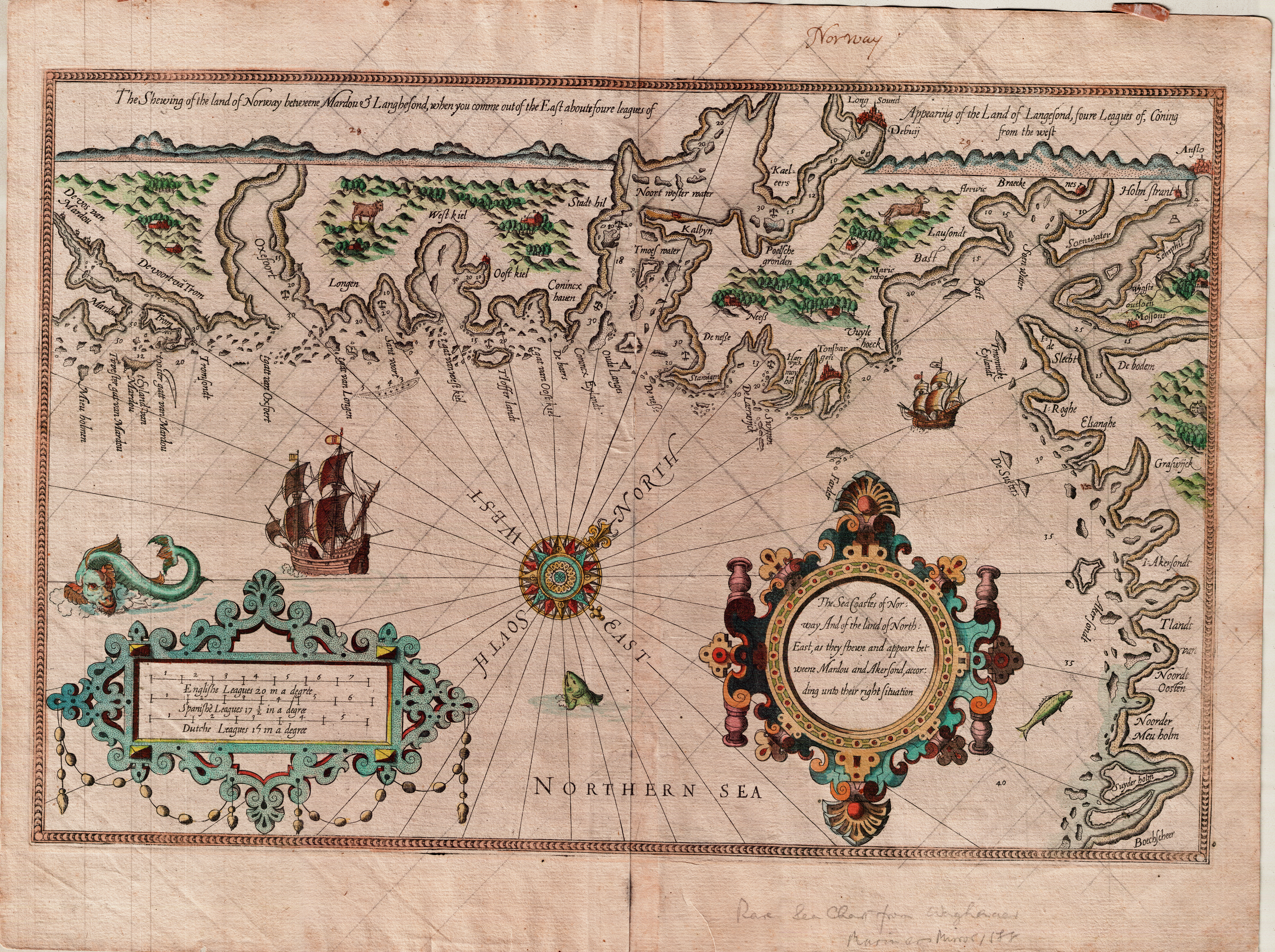 Sjøkart over Oslofjorden fra ukjent årstall. Håndtegnet i omtrentlig målestokk 1:400 000. Original kartstørrelse ca 54 x 41 cm. Et eksemplar befinner seg hos Statens kartverk Sjø i Stavanger.